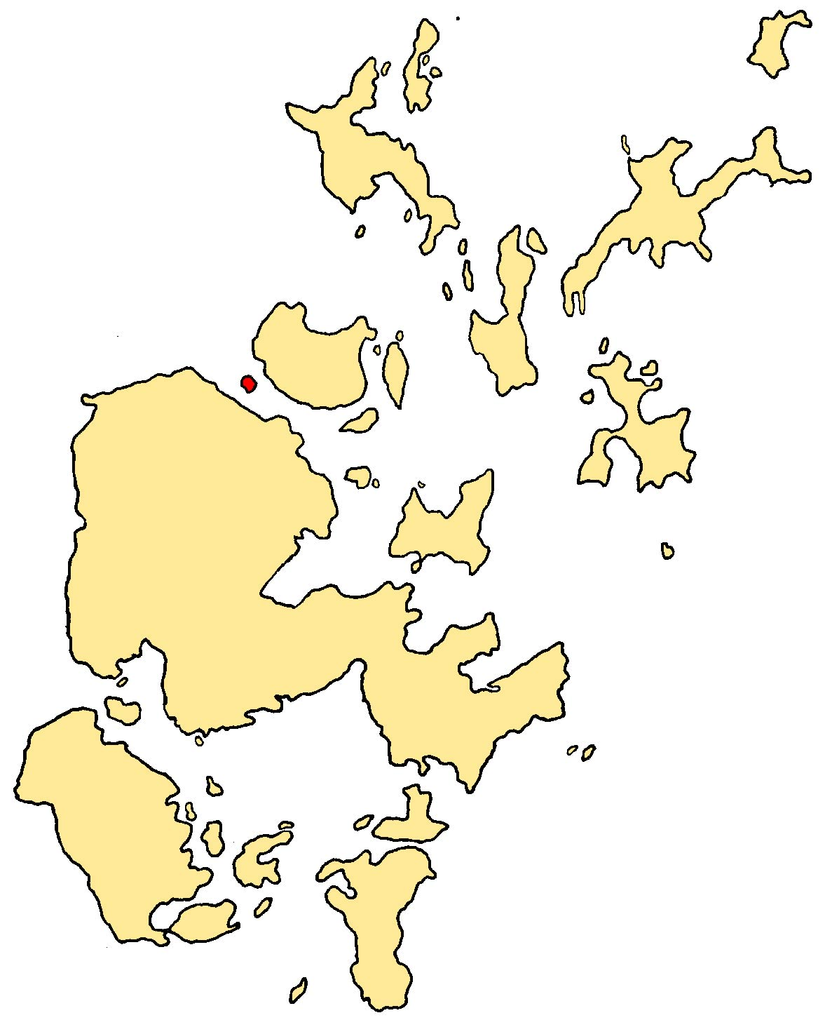 Eynhallow